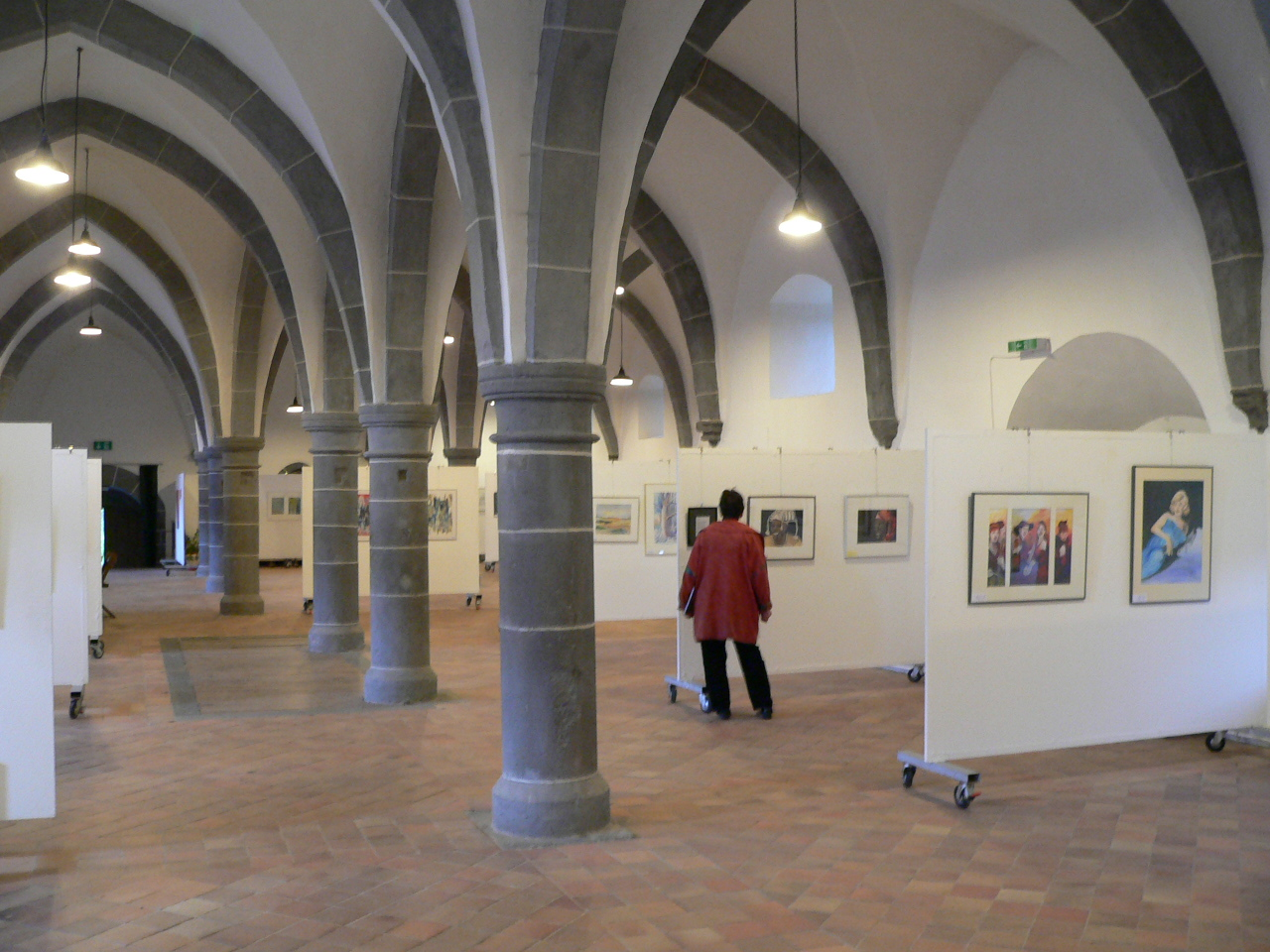 Dormitorium Kloster Arnsburg bei Lich, Hessen, Germany